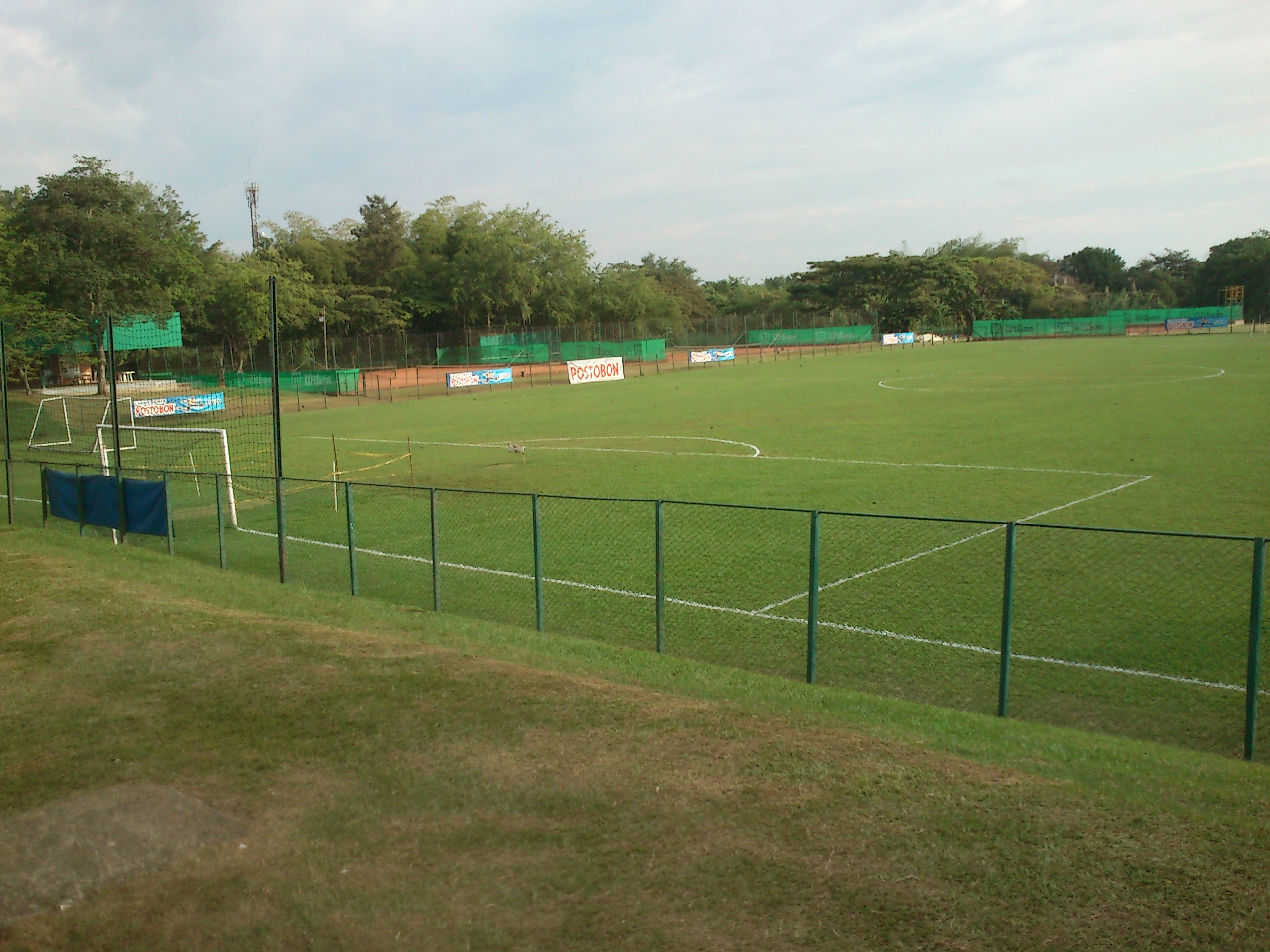 Sede campestre del Deportivo Cali. Cancha de fútbol